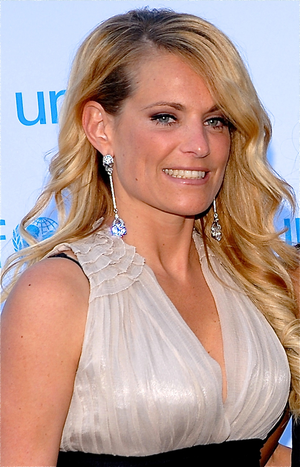 Laila Bagge på Unicef-gala i Stockholm den 1 maj 2012.